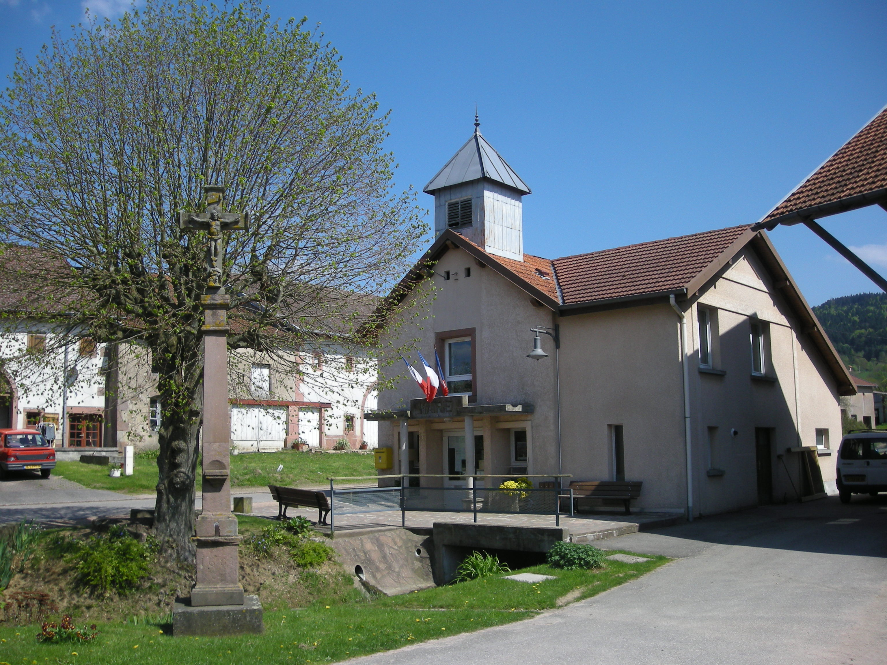 Le calvaire et la mairie de Combrimont (Vosges)